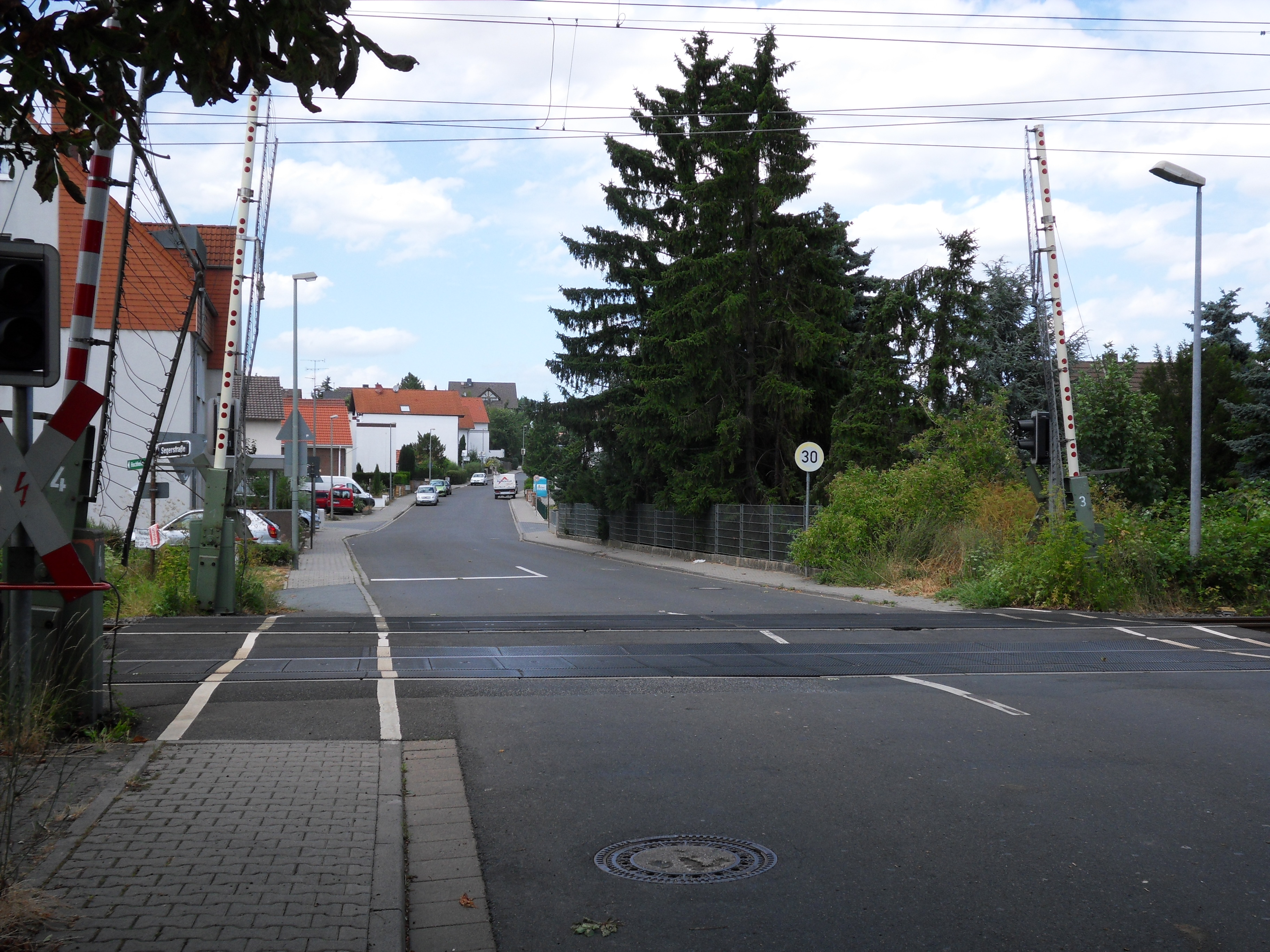 Die Falkenbergstraße ist die Haupterschließungsstraße des Flörsheimer Stadtteils Keramag/Falkenberg. Sie führt von der Landesstraße zwischen Flörsheim und Hochheim hinunter zum Bahnübergang beim Industriepark